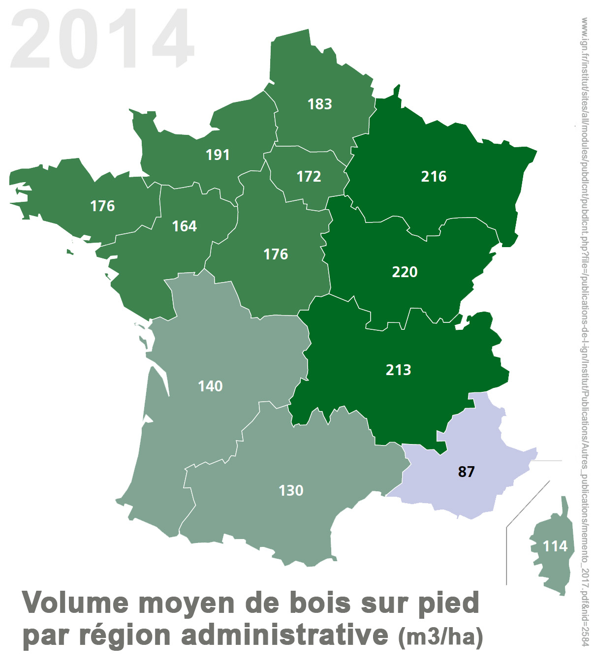 Volume de bois moyen sur pied en France en 2014 (estimation) d'après données et graphiques 2014 collectées par l'IGN et publiés en 2017 (IGN (2017) Le mémento ; Inventaire forestier 2017)